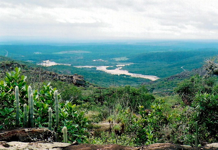 O rio Paraguaçu visto de longe, Bahia, Brasil.